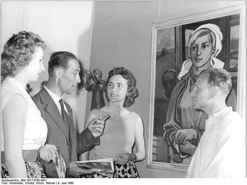 Zentralbild Hochneder-Krisch 9.6.1960 2. Arbeiterfestspiele des FDGB. Arbeiter besuchen die Kunstausstellung. Sehr aufgeschlossene und kritische Betrachter der in der Kunstausstellung des FDGB gezeigten Arbeiten von Berufs- und Laienschaffenden waren zahlreiche Werktätige, die an der Konferenz Schreibender Arbeiter anläßlich der Festspiele teilnehmen. UBz: Vor dem mit dem Kunstpreis des FDGB 1960 ausgezeichneten Gemälde des Berliner Malers Womacka "Junge Genossenschaftsbäuerin" bildete sich eine kleine Diskussionsgruppe. (Rechts) der Leipziger Dekorationsmaler Klaus Niethardt, Mitglied des Zeichenzirkels der Leipziger "Kirow-Werke", der Krempelausputzer Wolfgang Dörr aus Werdau (Mitte), die Bibliothekarin Barbara Laubt aus Zschopau und (lins) Karin Klenke, aus dem Automobilwerk Eisenach.